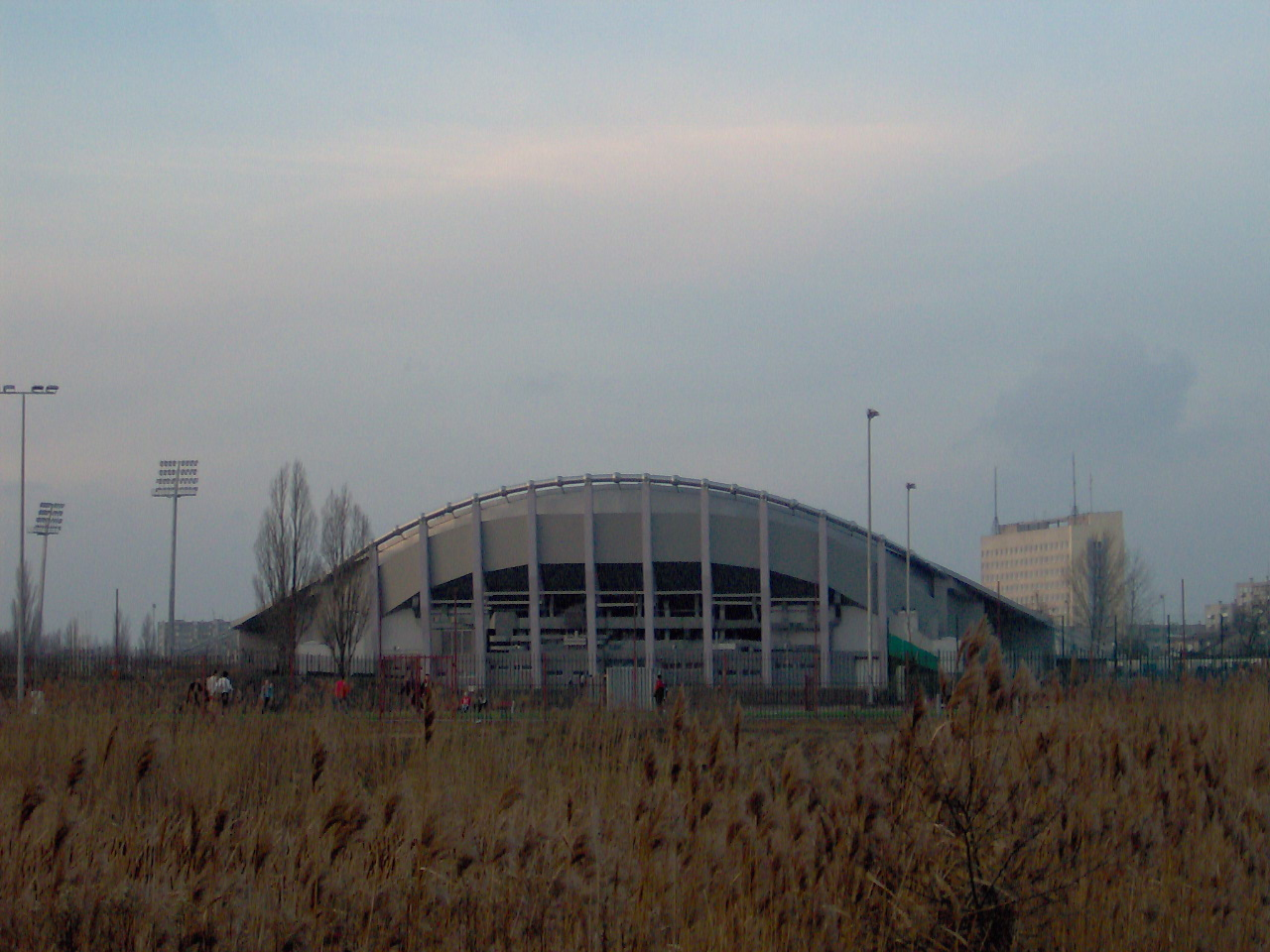 Hala Mistrzów (2007 r.)